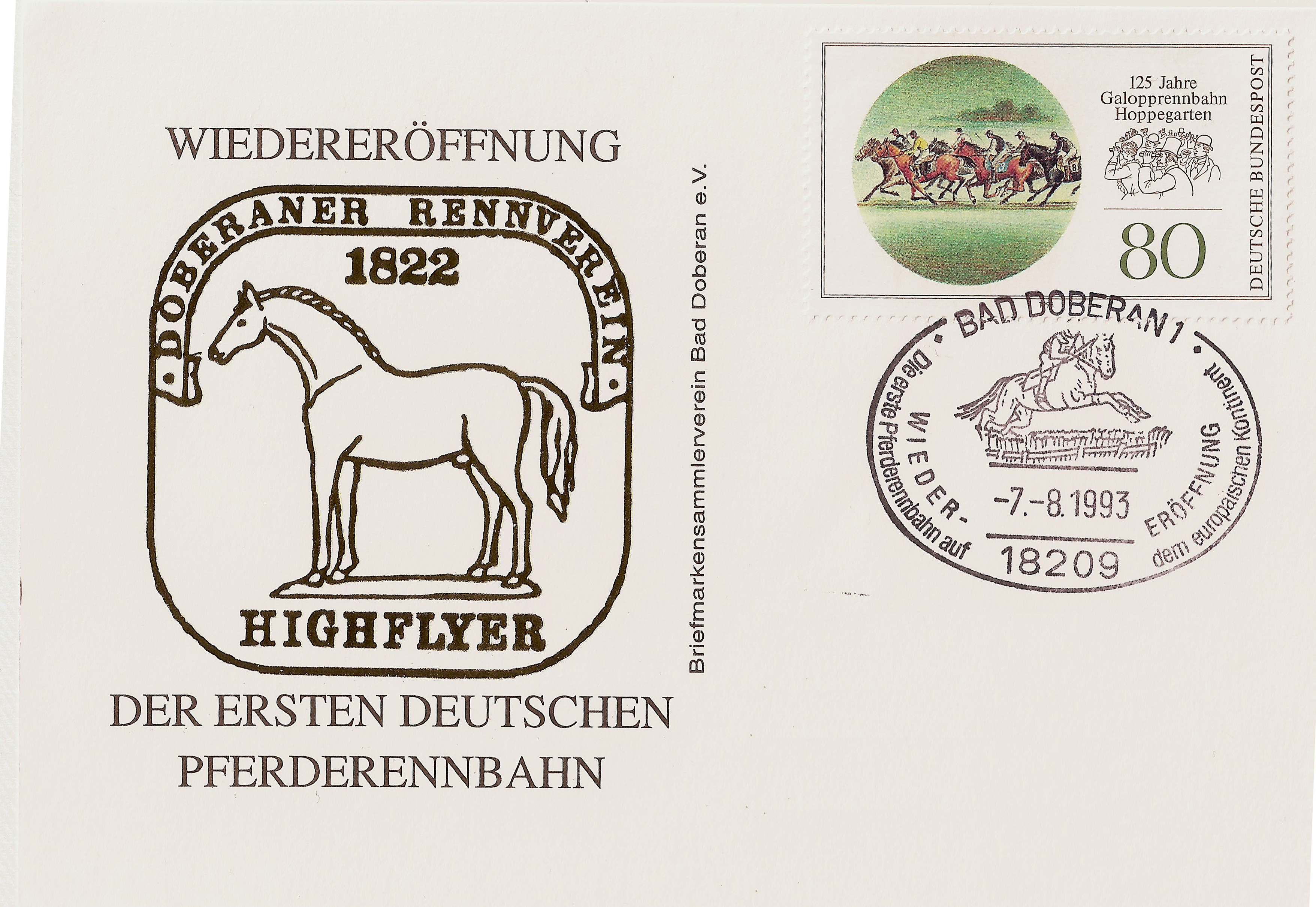 Gedenkpostkarte zur Wiedereröffnung der Ostseerennbahn Bad Doberan